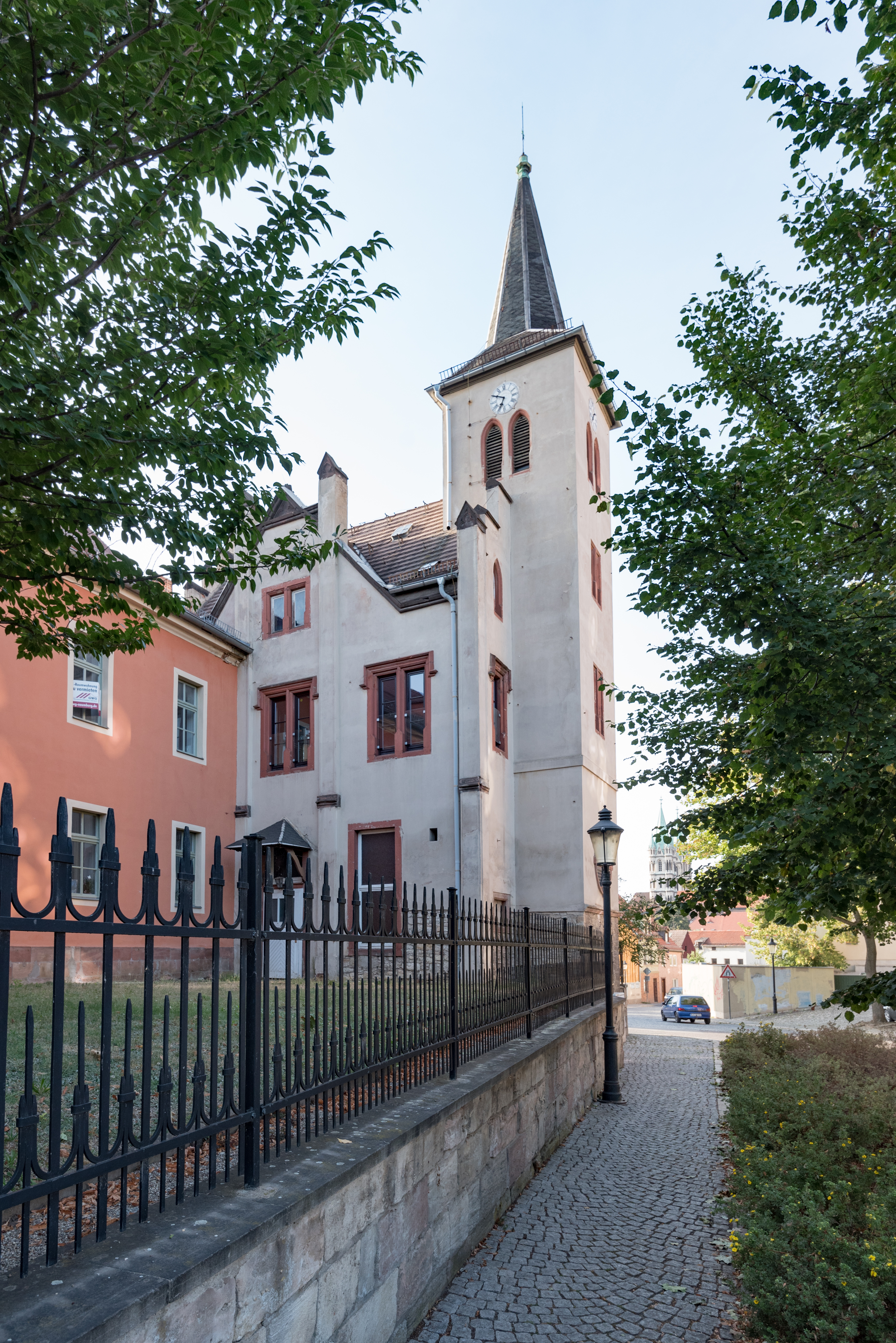 Naumburg (Saale), Kramerplatz 6, Hospital